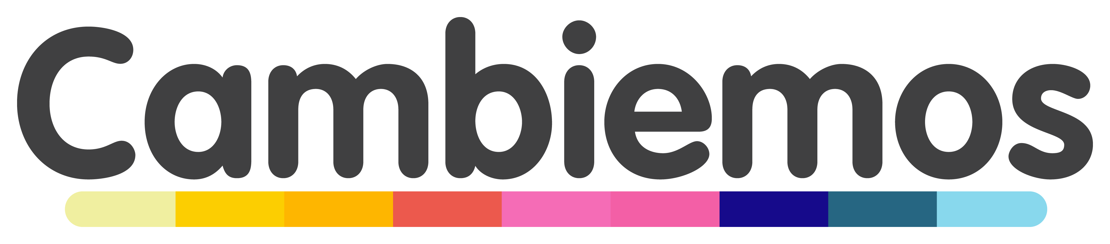 Símbolo de Cambiemos, alianza electoral argentina